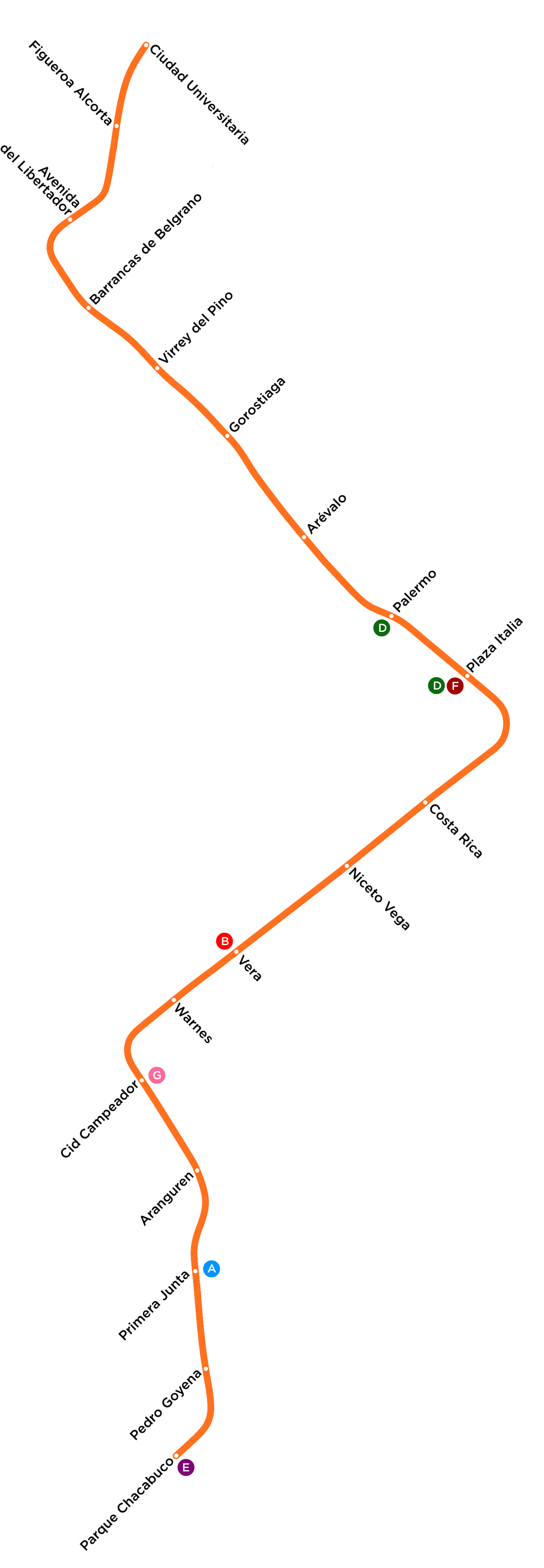 Recorrido de la línea I entre Parque Chacabuco y Ciudad Universitaria.